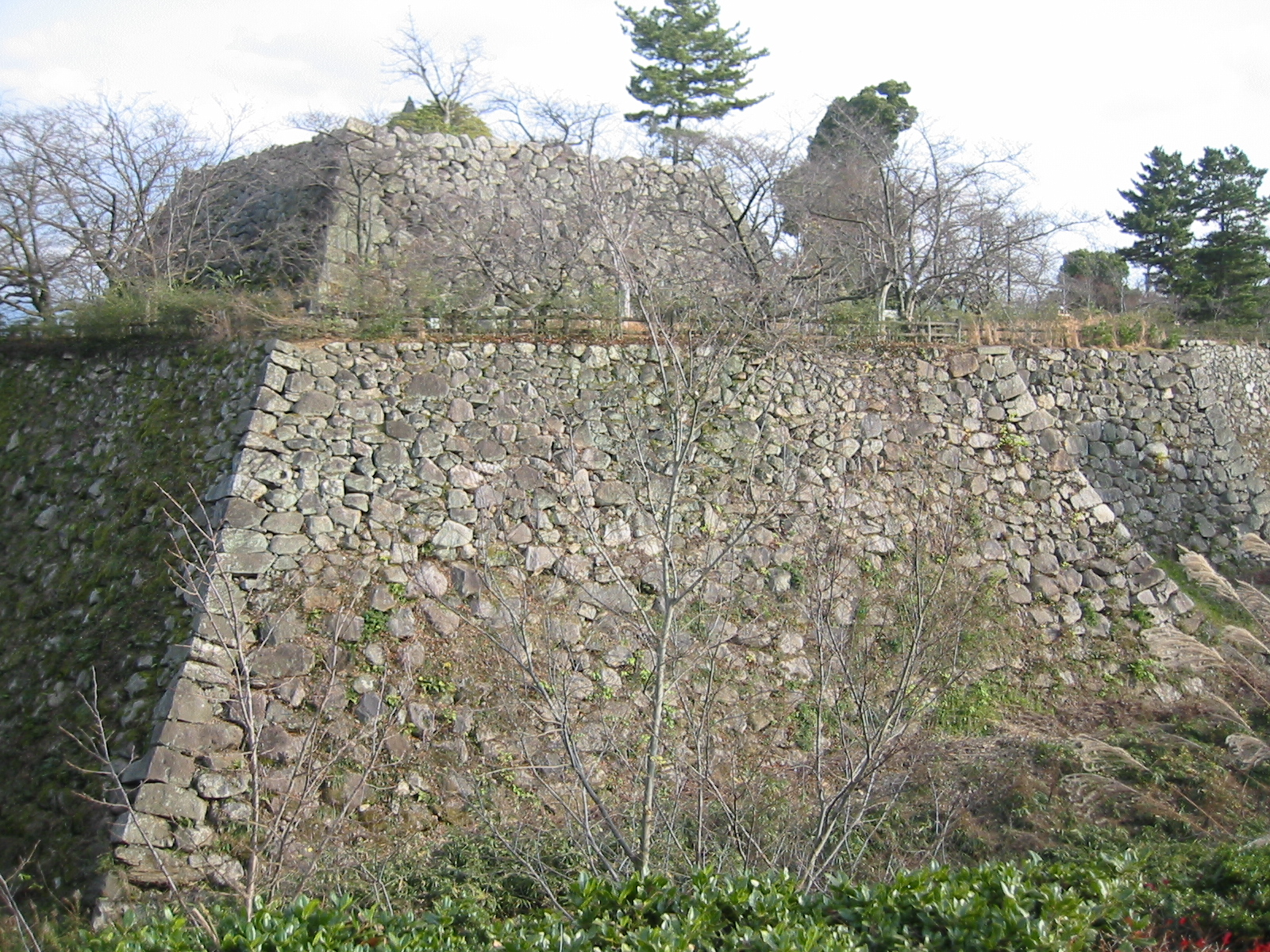 Kooriyama Castle